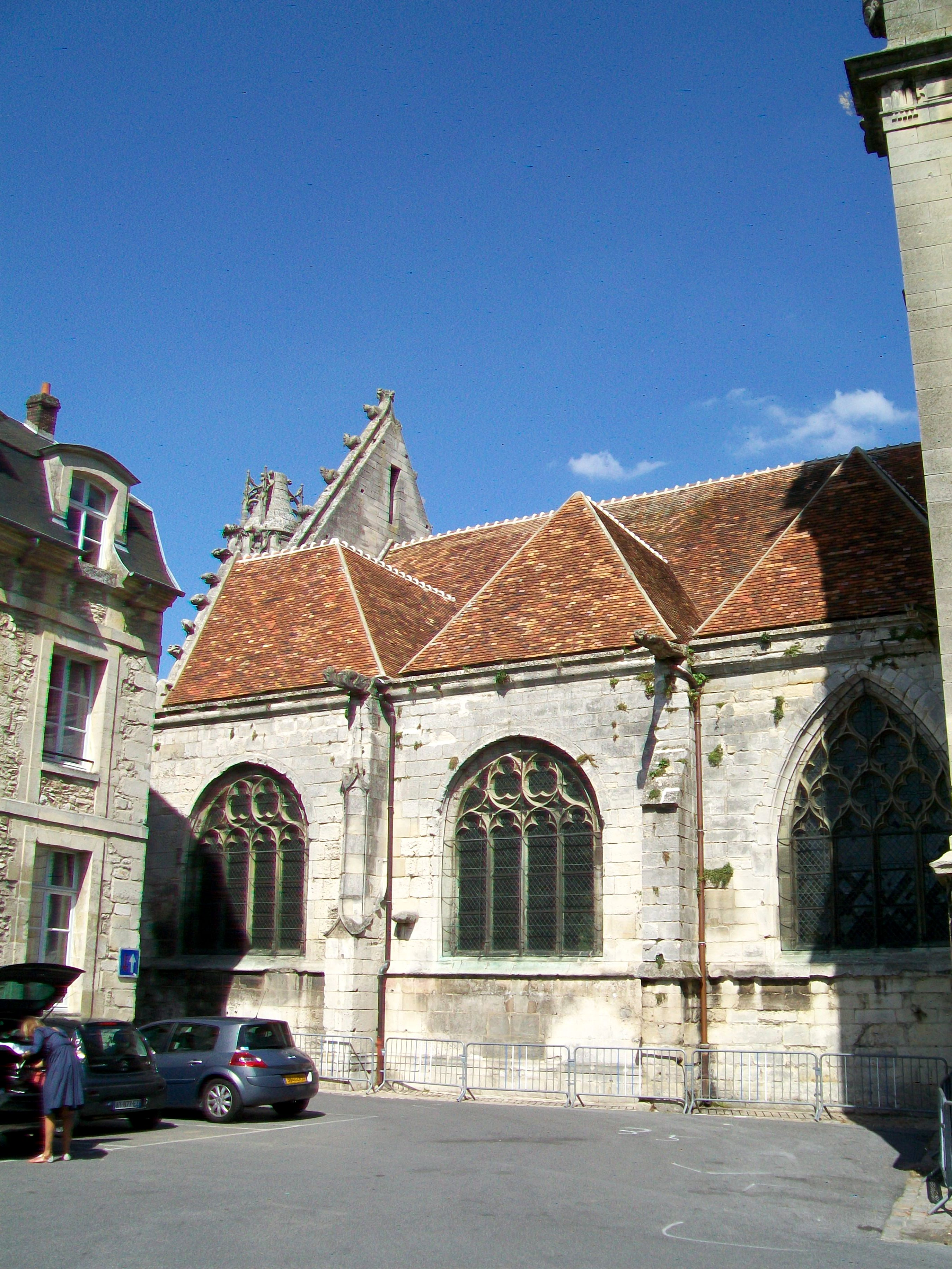 Les trois premières travées du bas-côté sud.